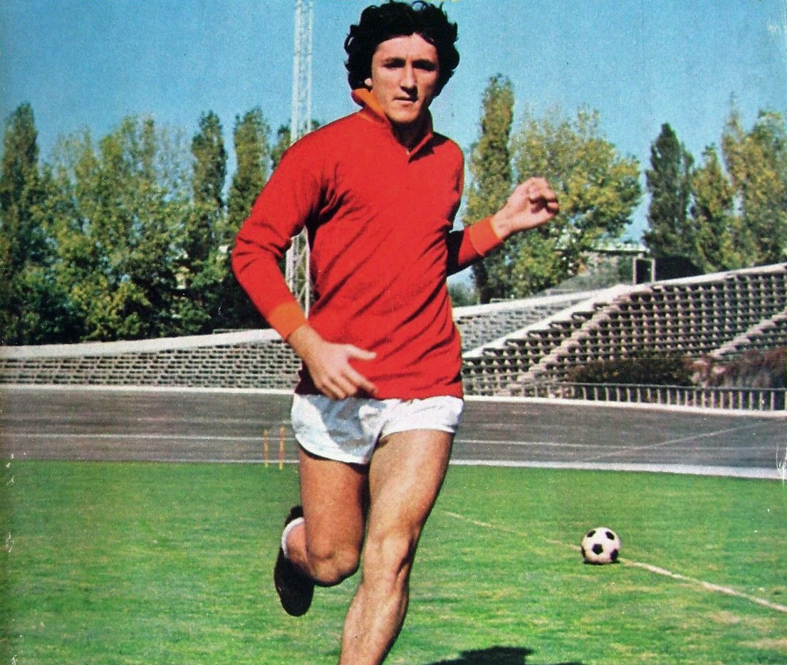 Il calciatore italiano Valerio Spadoni in azione alla Roma nel 1974.